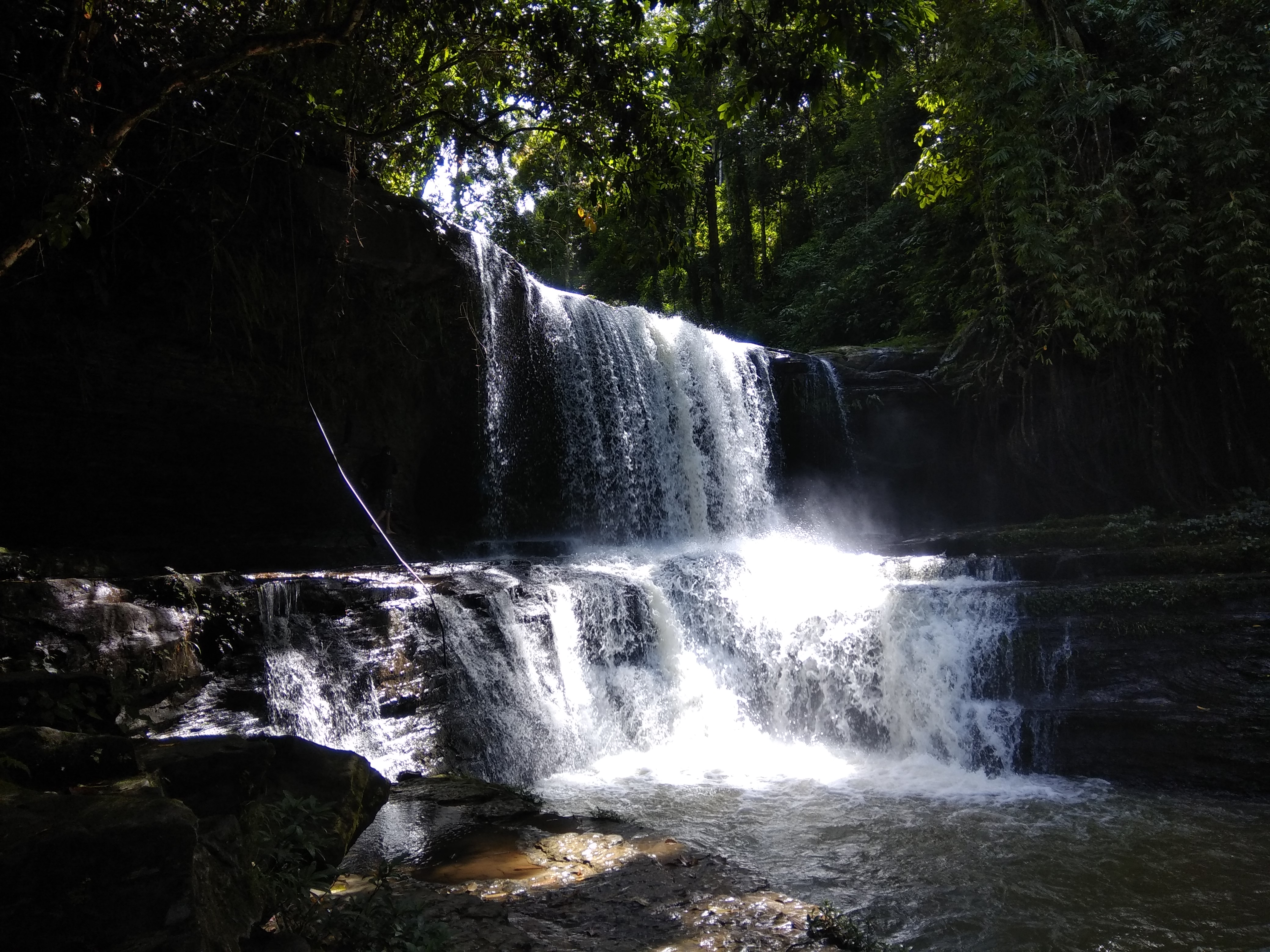 Tuirihiau falls, Mizoram